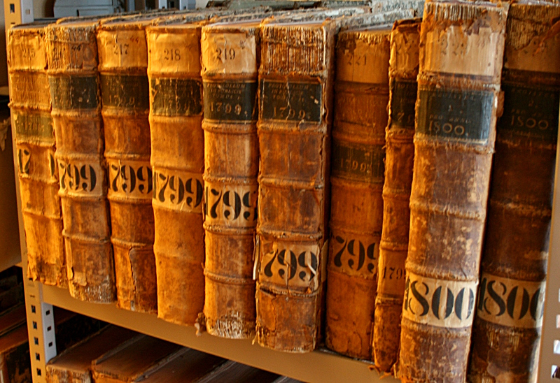 Knjige iz 1799. i 1800. u Hrvatskom državnom arhivu